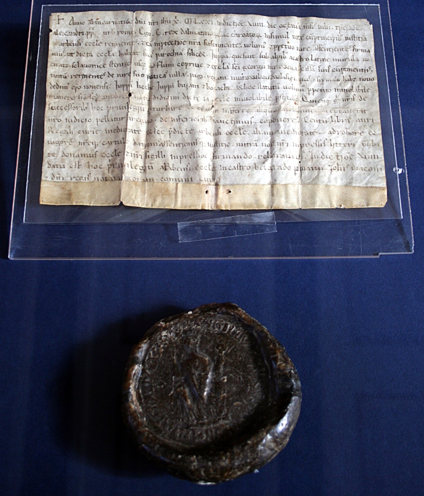 Odredba i potvrda kralja Petra Krešimira IV. o području Rapske biskupije (8. srpnja 1071. U Biogradu). HR-HDA-876-7. Hrvatski državni arhiv